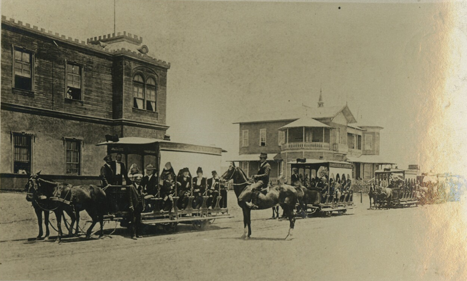 Tranvías del Ferrocarril Urbano de Iquique con turistas de Estados Unidos, en un viaje a través de esta ciudad del desierto.